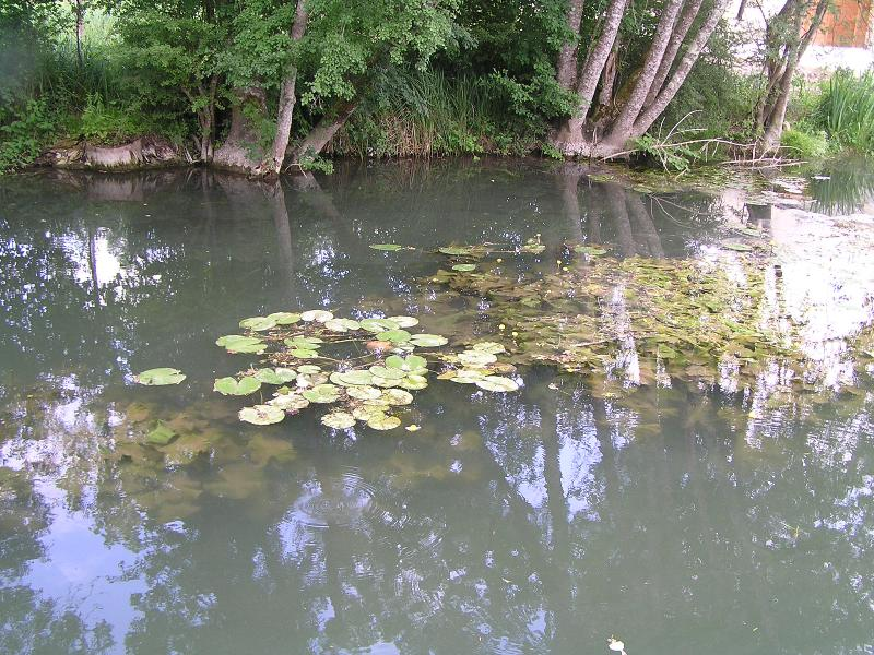 L’Antenne près de Cherves-Richemont